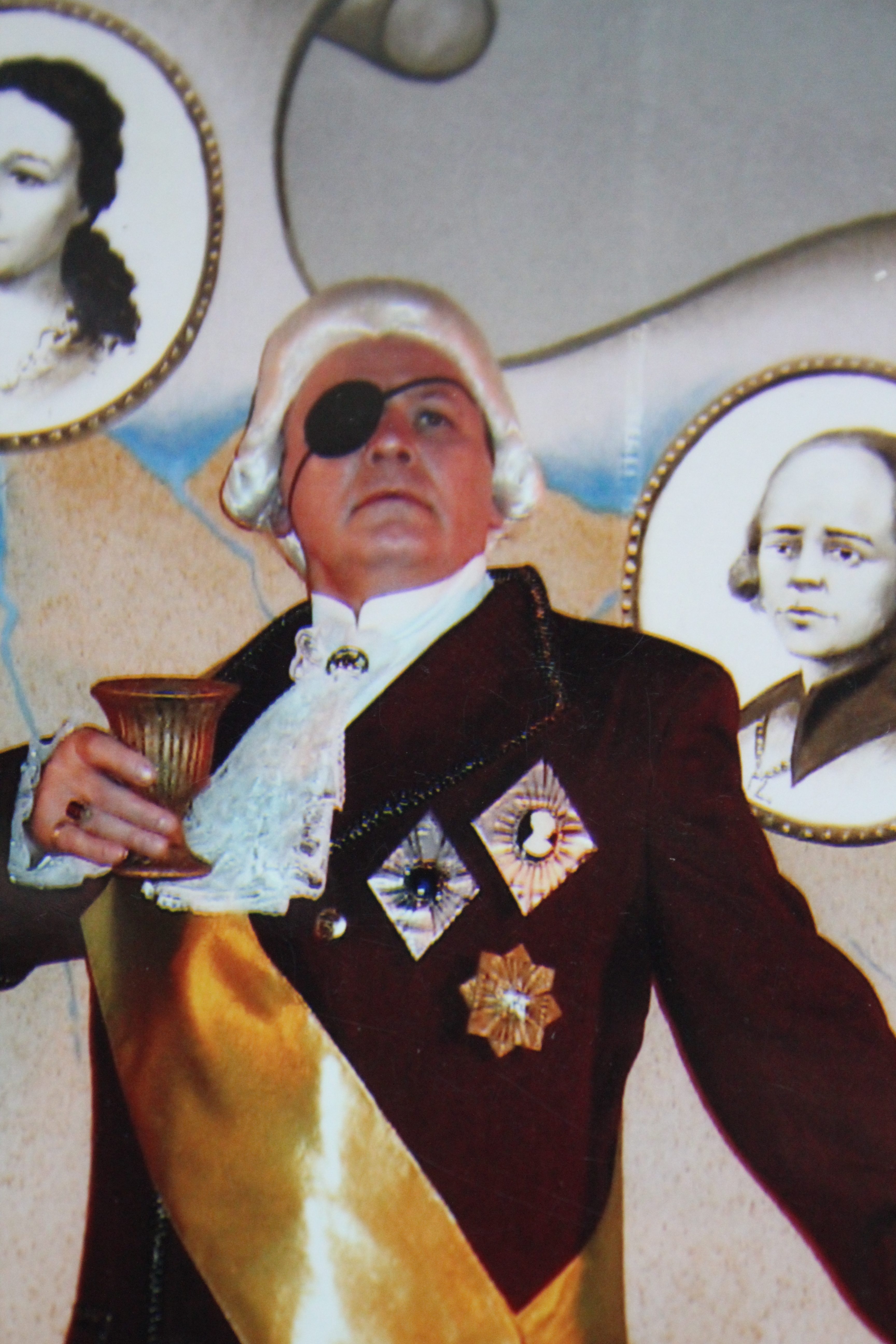 Сцена из спектакля «Любовь и смерть. Мужчины Екатерины Великой» Санкт-Петербургского драматического театра «Патриот» РОСТО. В роли Григория Потёмкина Геннадий Егоров. Режиссёр-постановщик Геннадий Егоров.